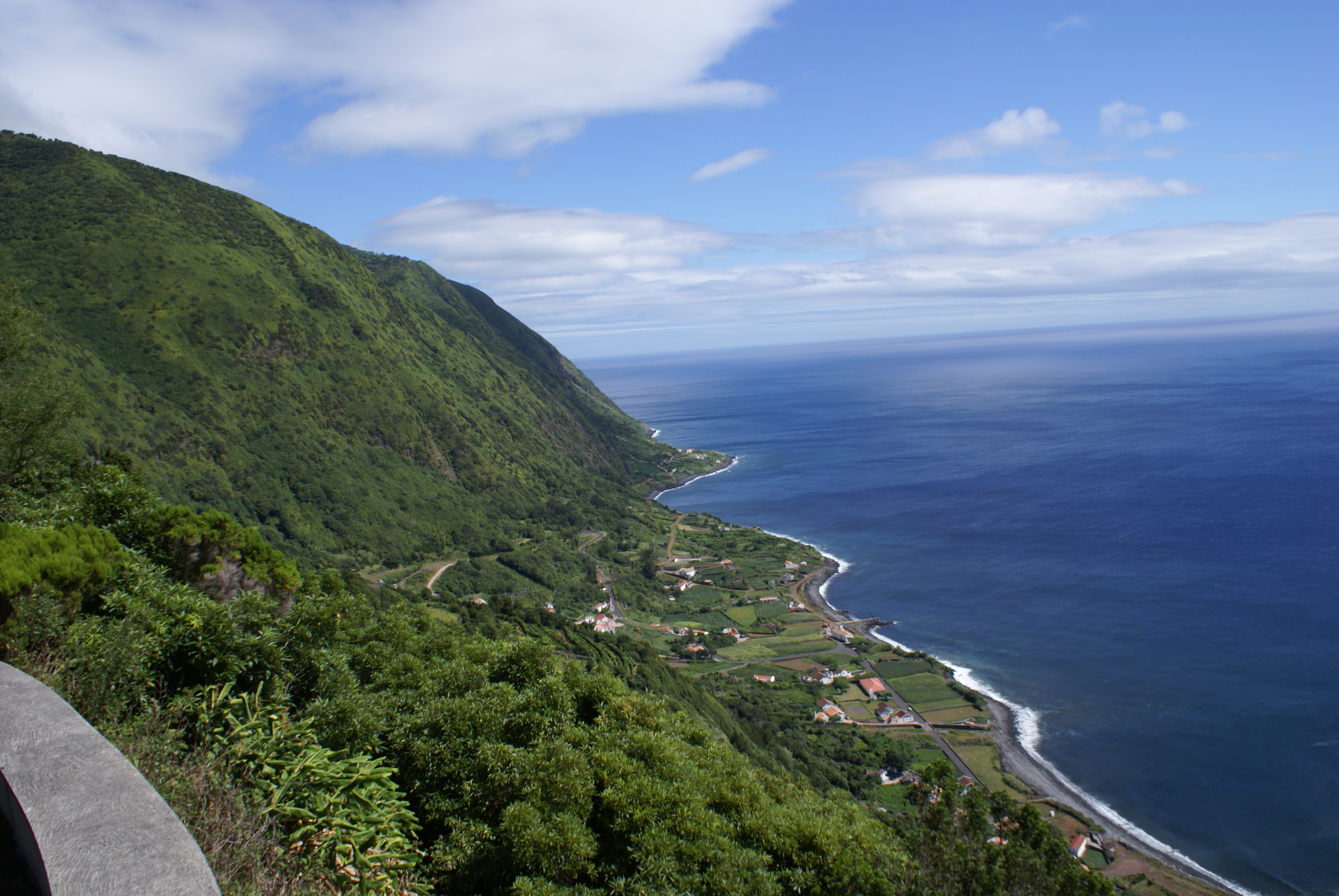 Miradouro da Fajã do Vimes, vista da fajã, Calheta, ilha de São Jorge, Açores